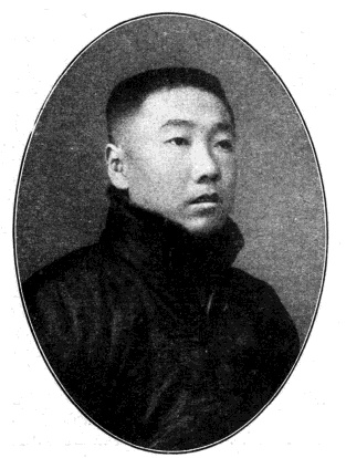 中華民國國會議員